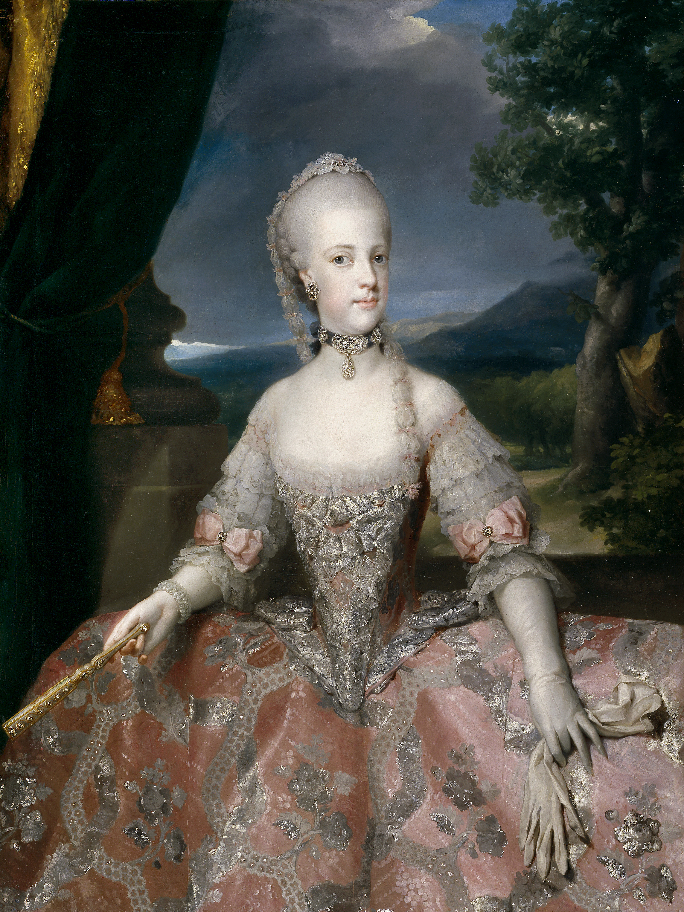 Retrato de María Carolina de Austria (1752-1814), que fue hija del emperador Francisco I del Sacro Imperio Romano Germánico y de la emperatriz María Teresa I de Austria y reina consorte de Nápoles por su matrimonio con el rey Fernando I de las Dos Sicilias.